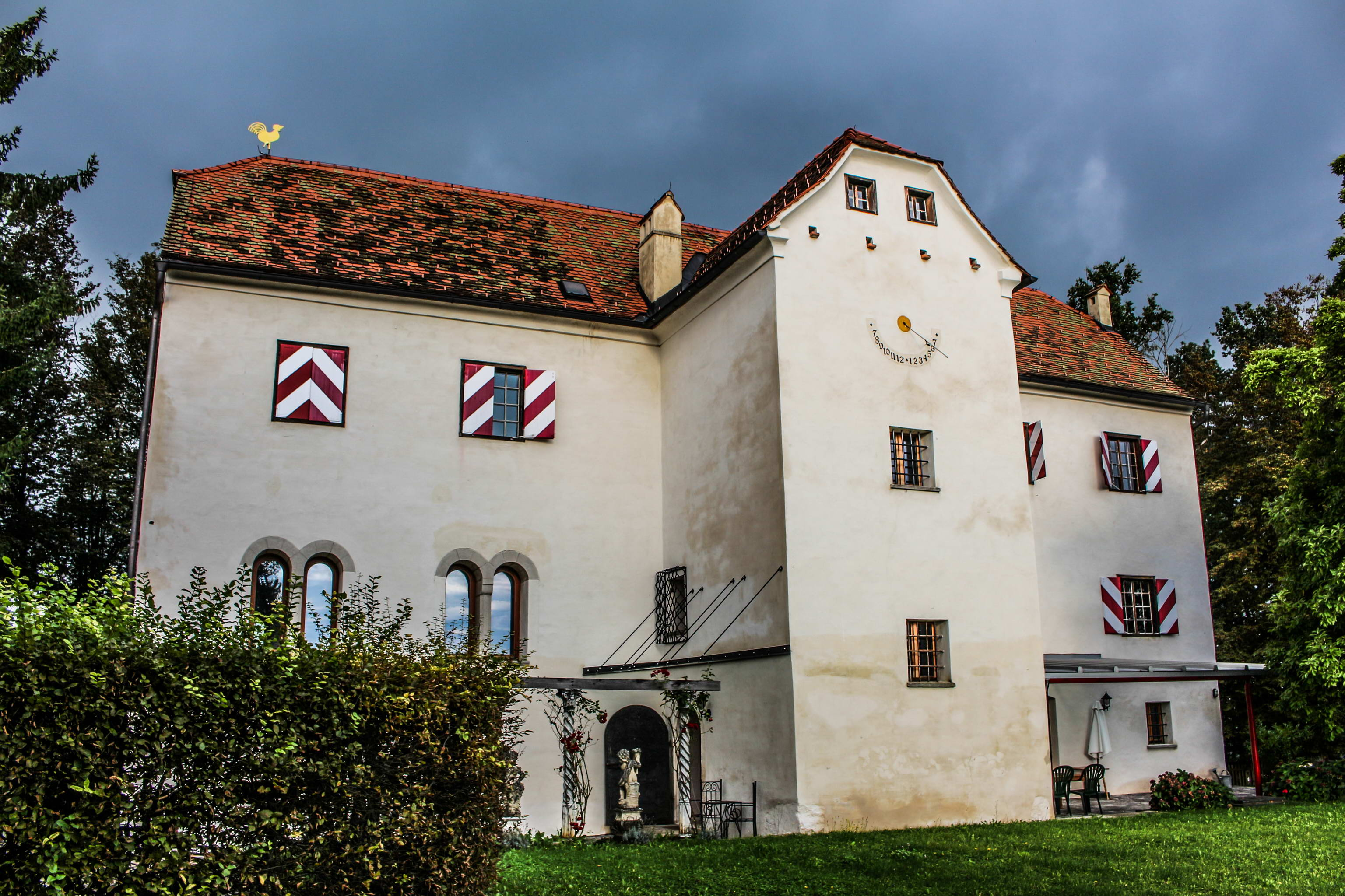 Hitzendorf – Schloss Tausendlust Dieses Bild wurde anlässlich des österreichischen Tags des Denkmals 2014 in der Steiermark eingereicht.